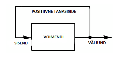 Joonis 1. Positiivse tagasiside plokkskeem